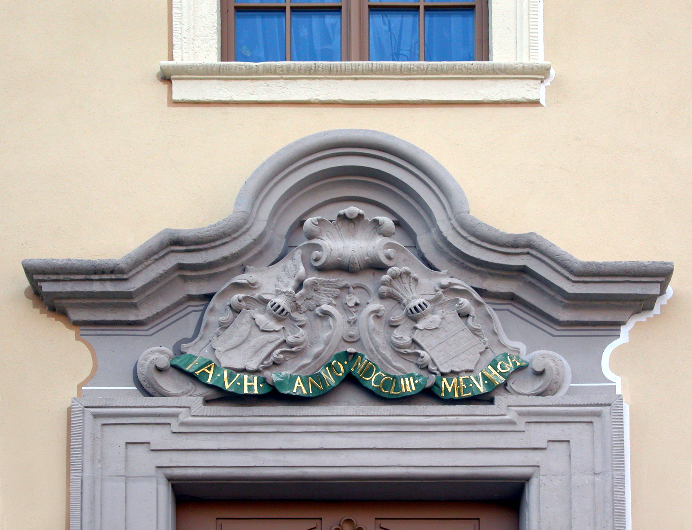 26.08.2007 01594 Staucha (Stauchitz), Thomas-Müntzer-Platz 2: Rittergut Staucha. Herrenhaus errichtet zwischen 1753 und 1756 von Alexander von Hartitzsch. Die Supraporte (1753) stellt das Ehewappen des Julius Alexander von Hartitzsch und seiner Ehefrau Magdalena Elisabeth von Zehmen dar. [DSCN29098.TIF]20070826305DR.JPG(c)Blobelt